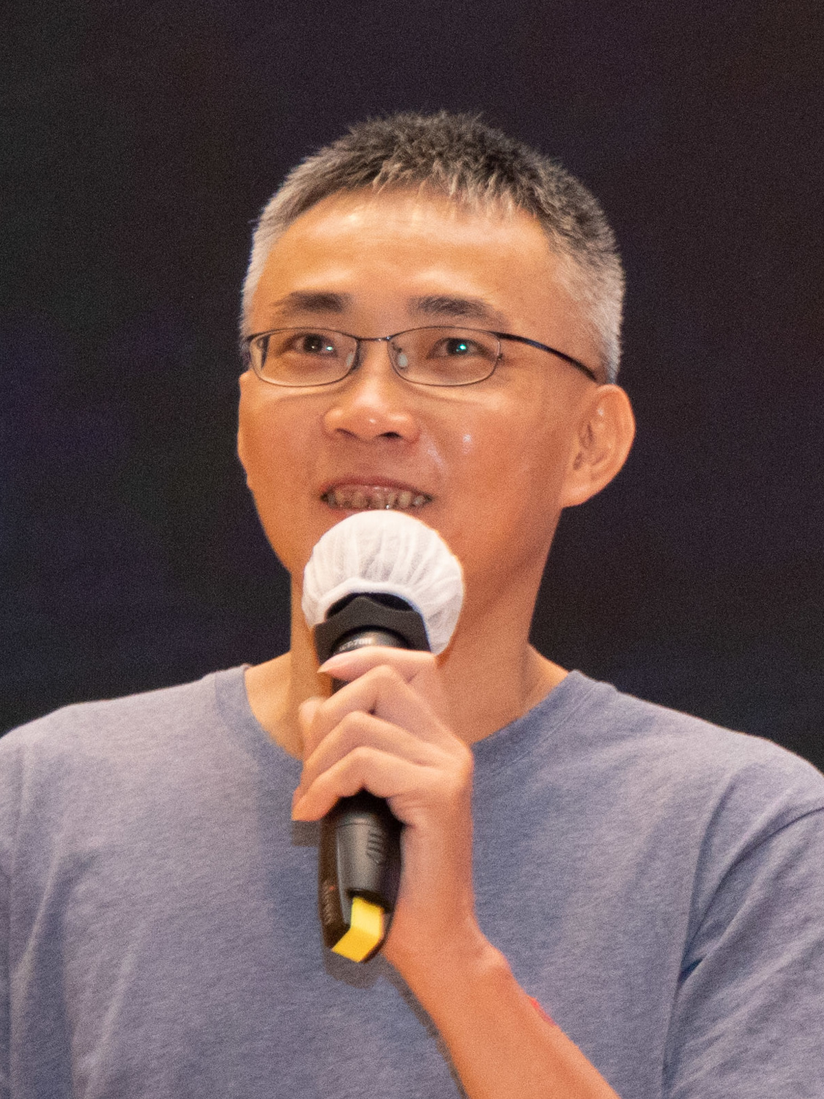 臺灣資安科學家陳盈豪（CIH）於 2020 年學生計算機年會演講，2020 年 8 月 8 日攝於中央研究院人文及社會科學館國際會議廳。原 Flickr 標題為《丞相-1285》。